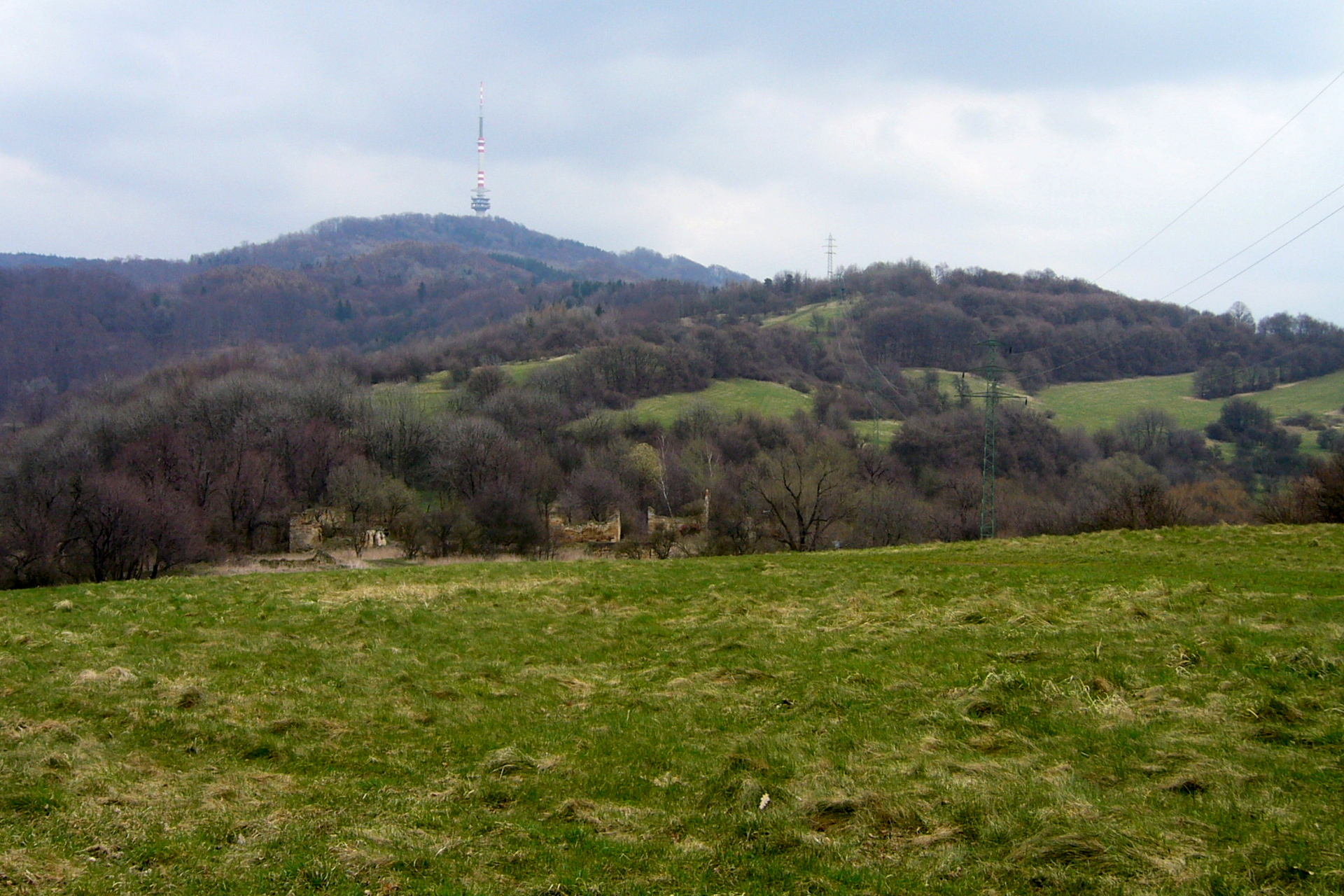 Celkový pohled na zaniklou vesnici Vitín ze západu, v pozadí Buková hora